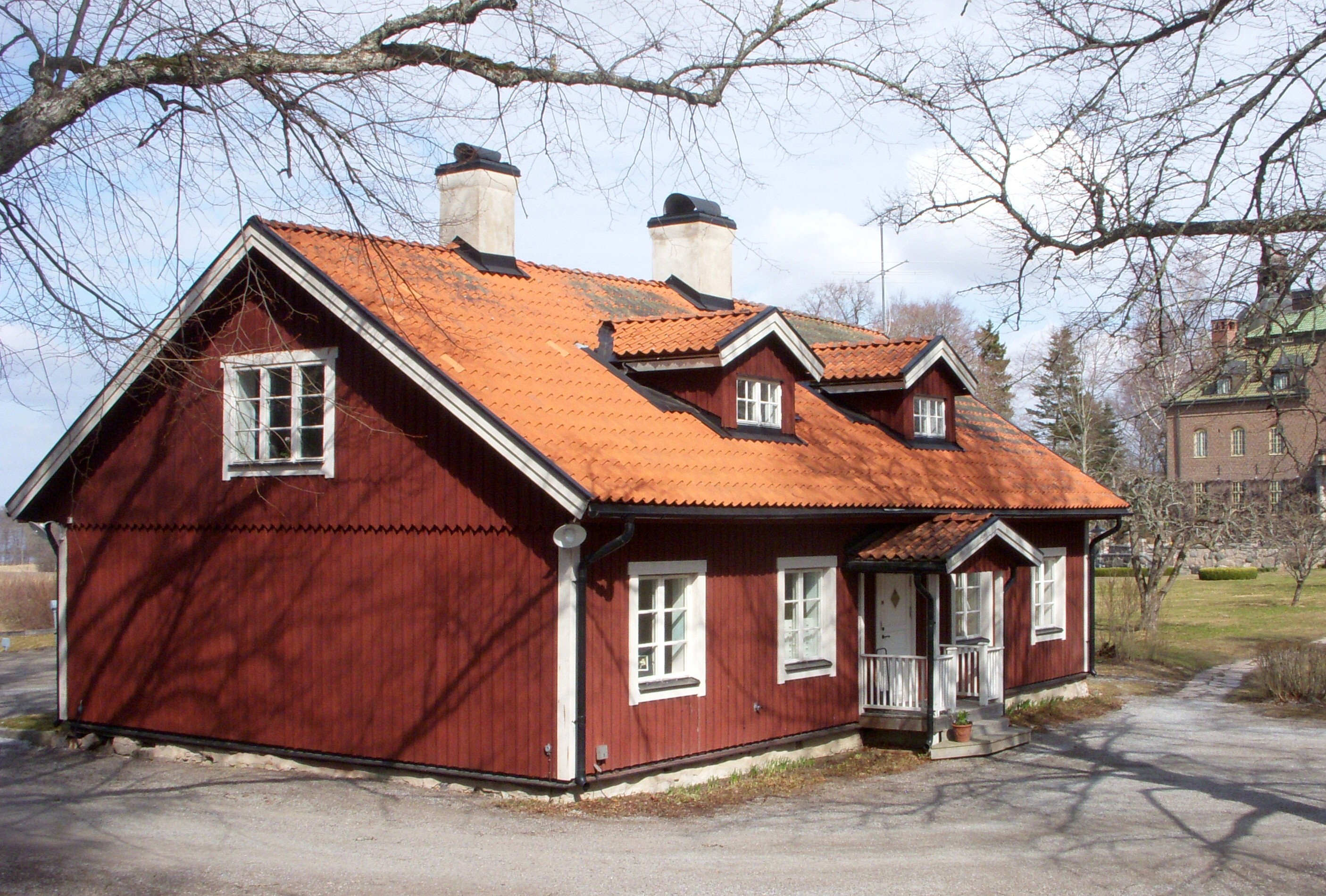 Röda stugan: Ängsholm, även Engsholms slott i Ytterjärna socken, Södertälje kommun, Stockholms län